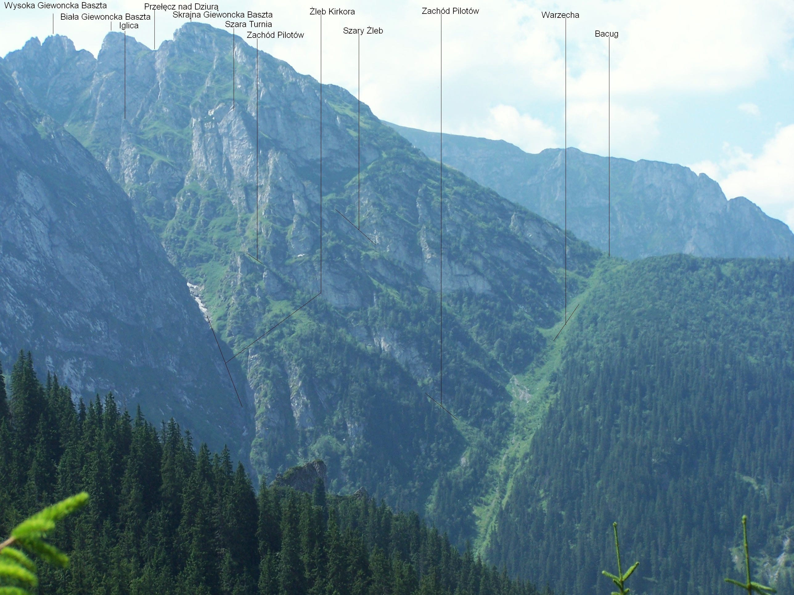 Widok z Sarniej Skały